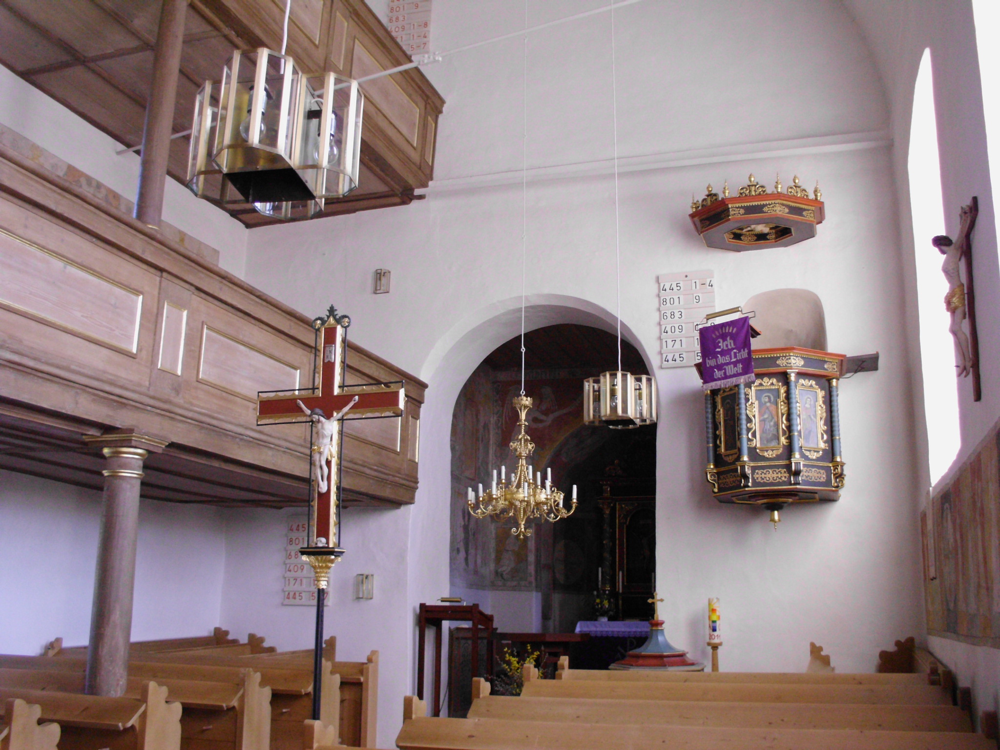 Evang.-Luth. Pfarrkirche St. Michael in Pfofeld im Landkreis Weißenburg-Gunzenhausen, Kircheninneres gegen Osten